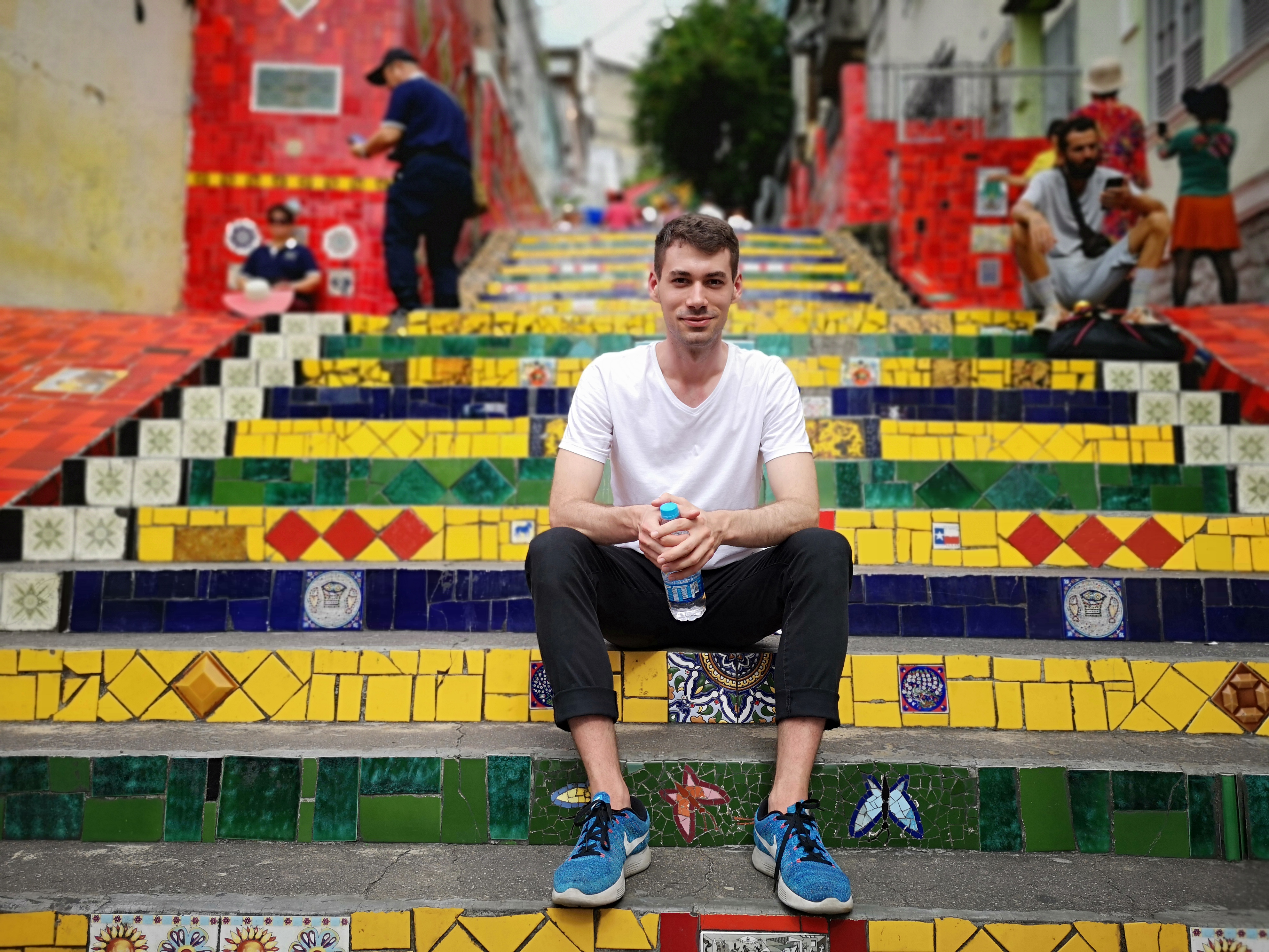 Martin Vydra v Rio de Janeiro